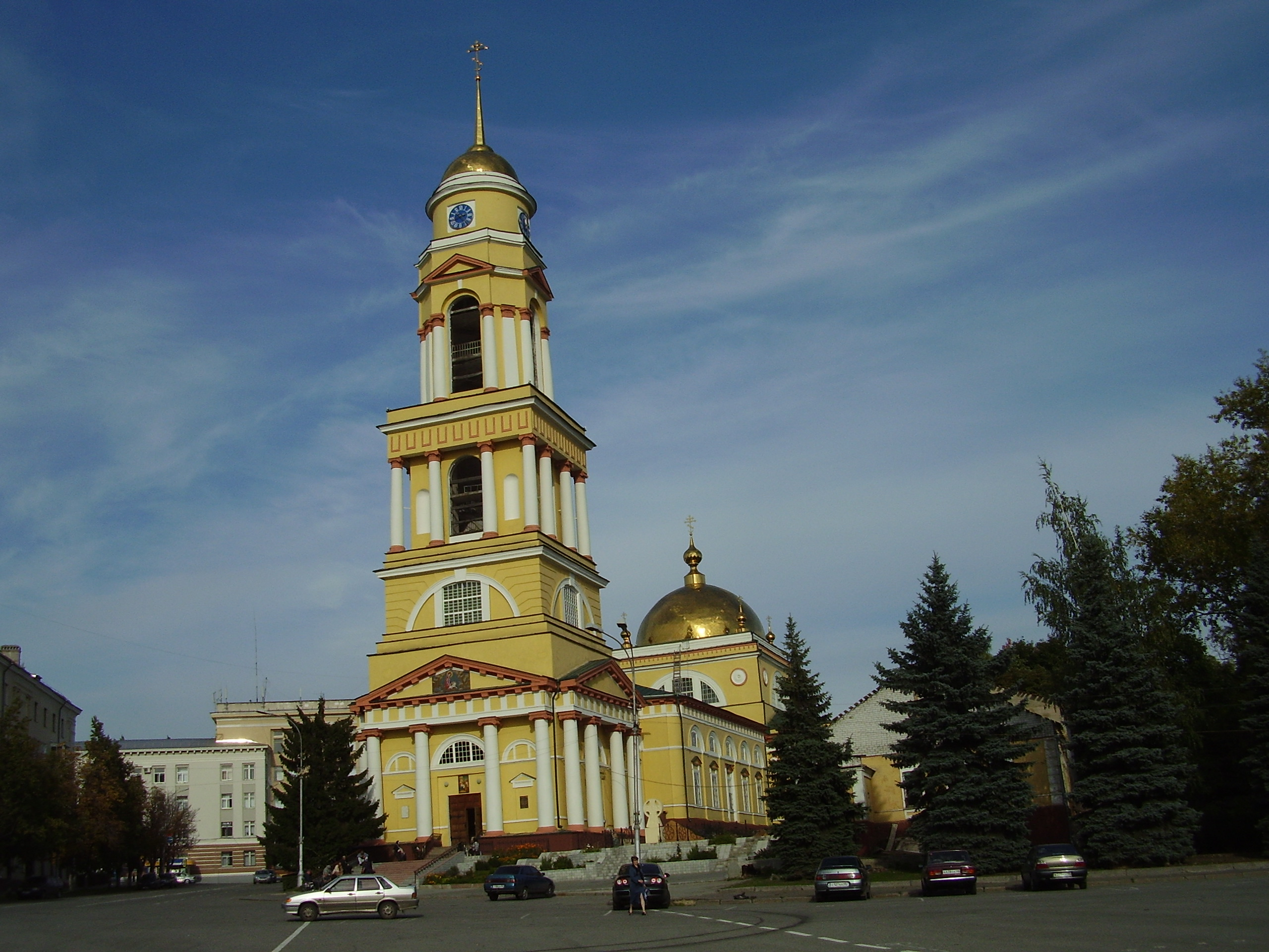 Липецк,кафедральный собор